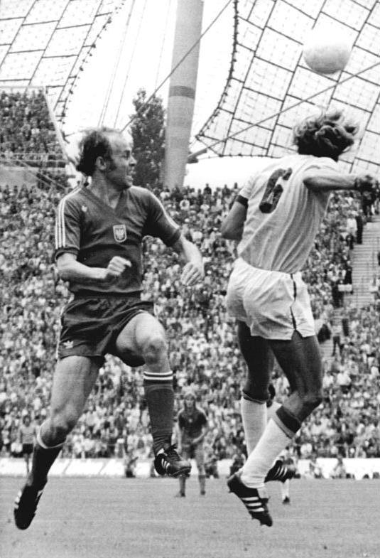 ADN-ZB-Mittelstädt-6.7.74-ma-BRD-München: X. Fußball-Weltmeisterschaft-Spiel um den dritten Platz: VR Polen - Brasilien 1:0- Der Schütze des "Goldenen Tores" Grzegorz Lato (links) im Kopfball-Duell mit Francisco Marinho (Brasilien-rechts)."